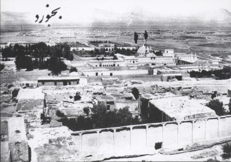 تصویری قدیمی از بجنورد